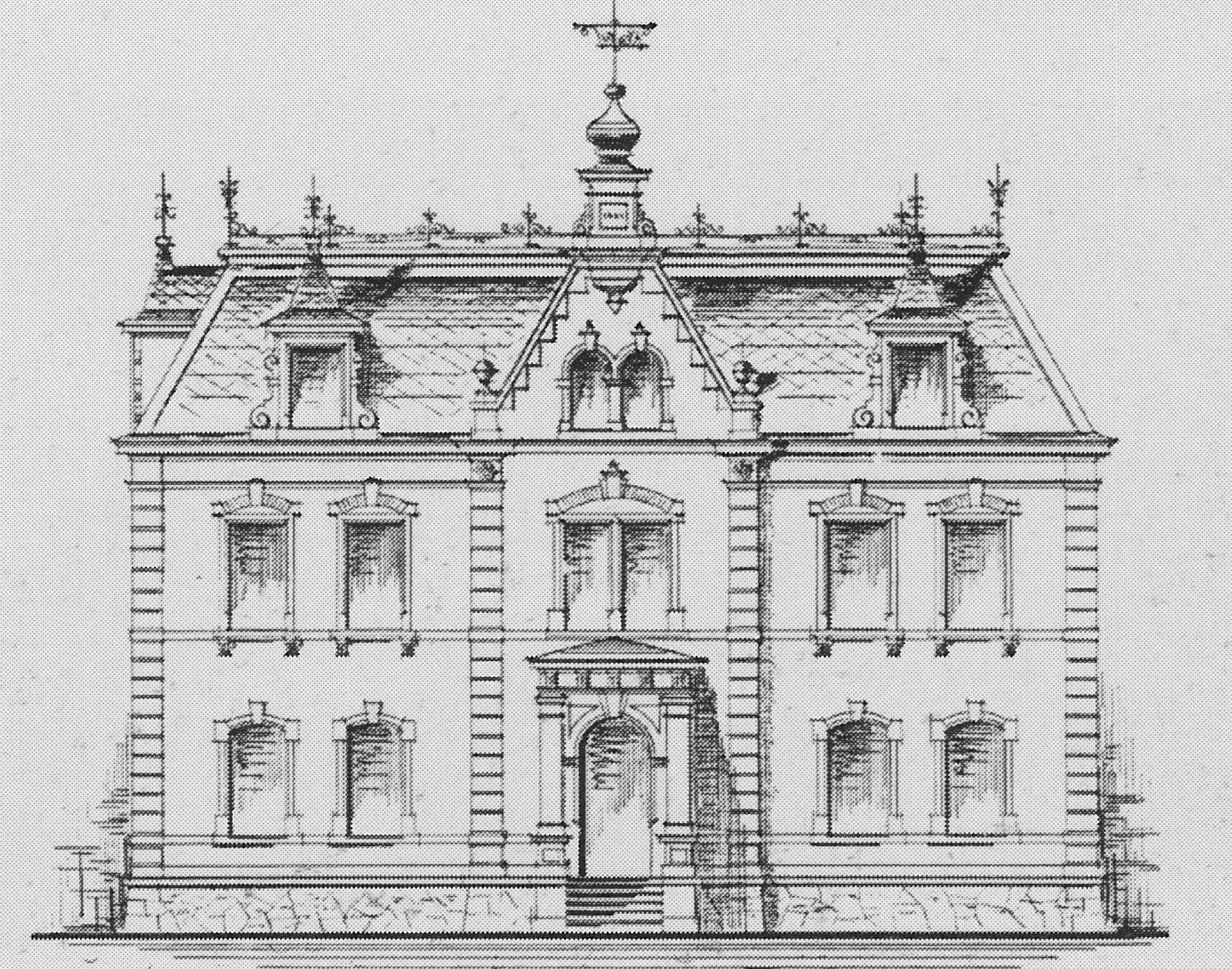 Radebeul Volksschulgebäude Oberkötzschenbroda Bauzeichnung 1901